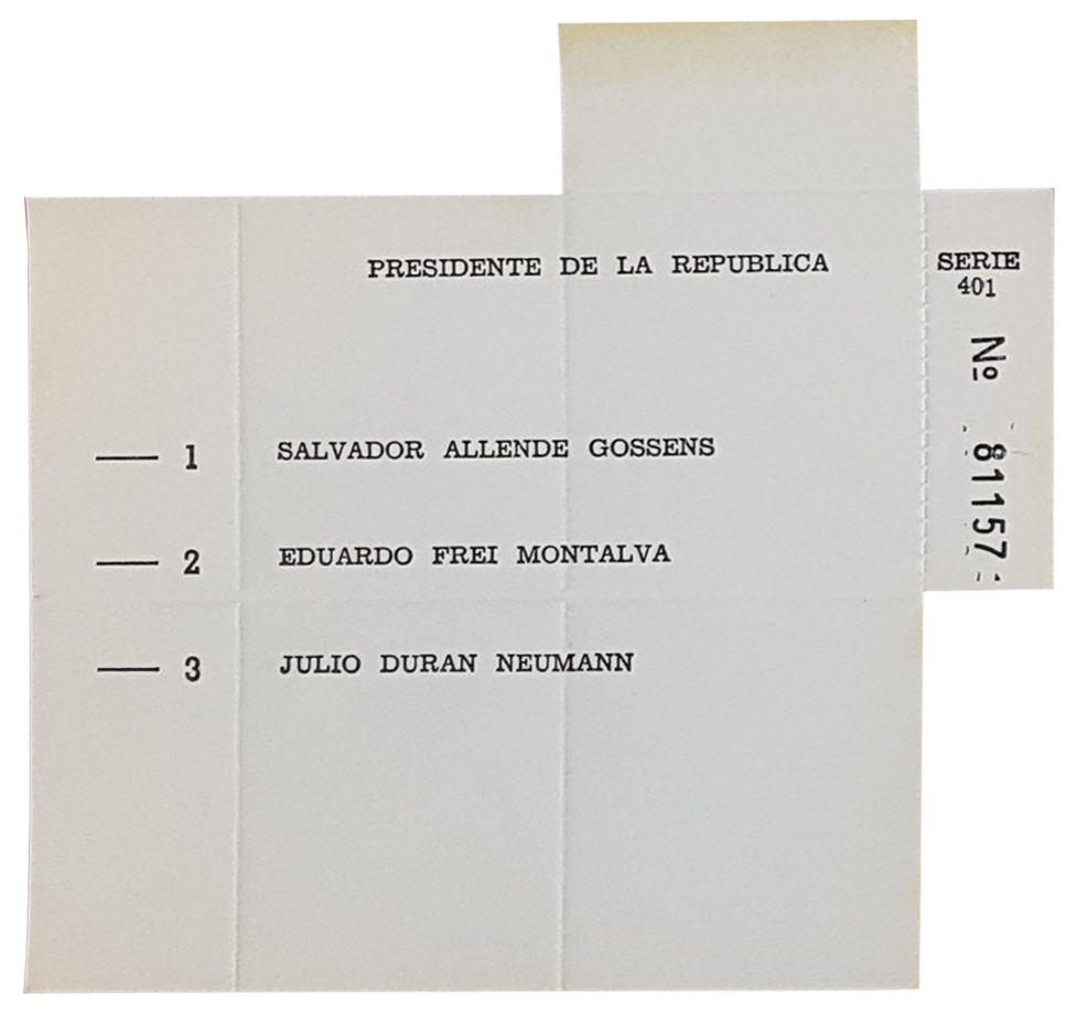 Voto utilizado en la elección presidencial de Chile de 1964.